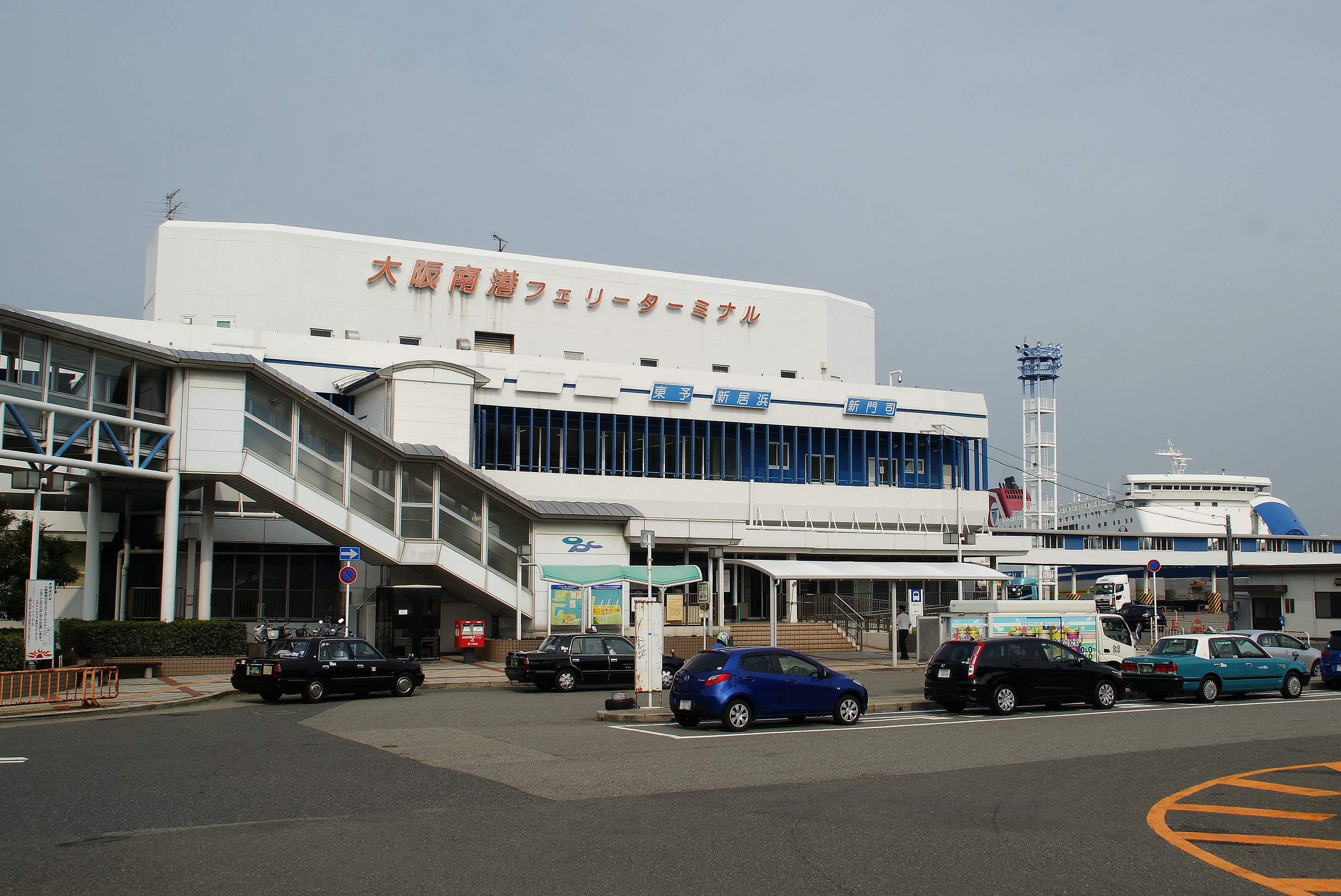 Osaka Port, Osaka Nanko Ferry Terminal.(Suminoe Ward, Osaka City, Osaka Prefecture, Japan)